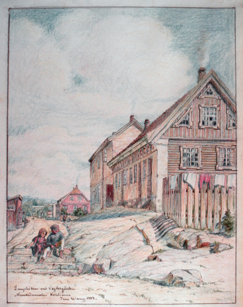 Fra Munkedamsveien